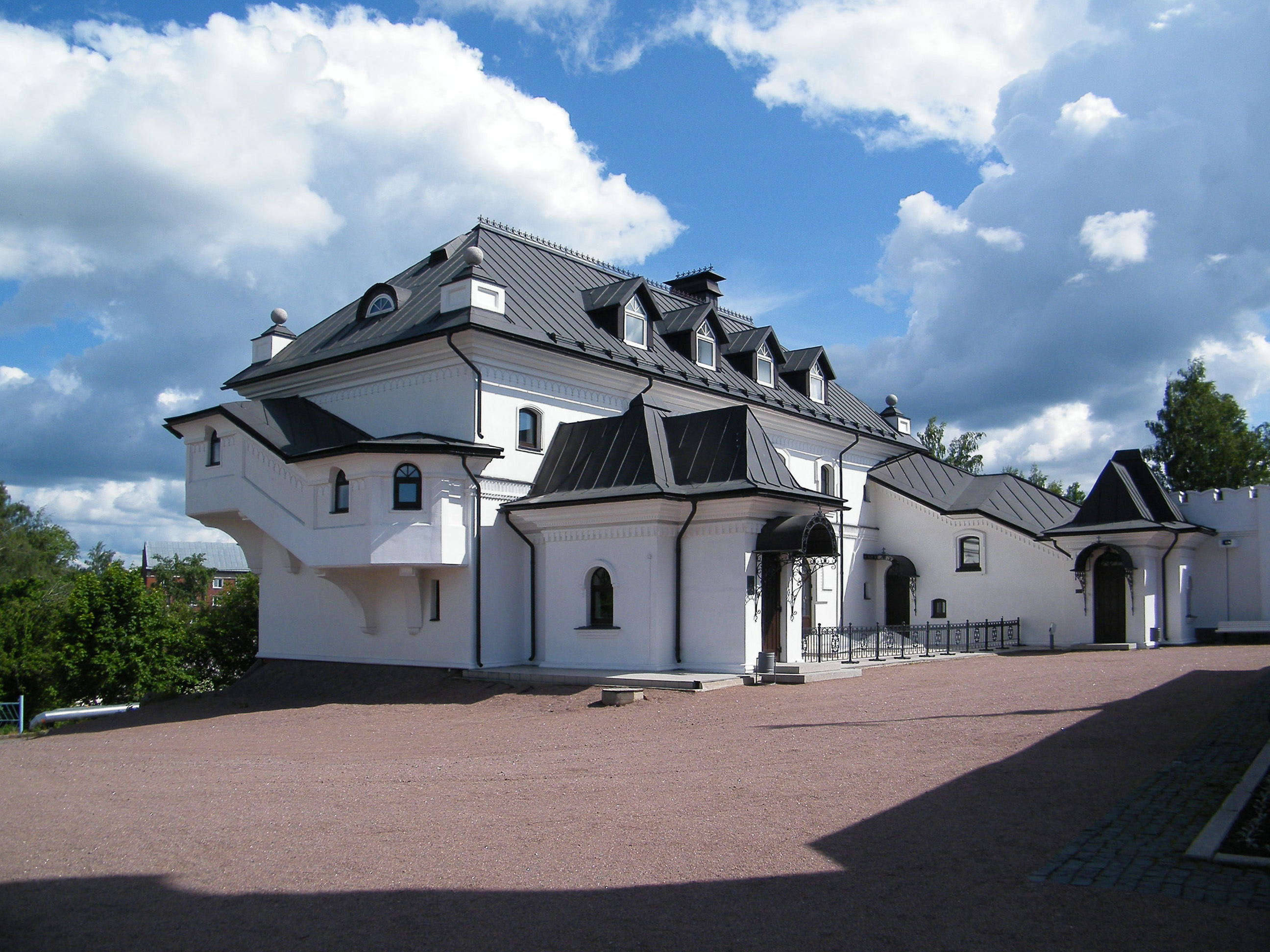 Церковный дом Свято-Ильинского храма